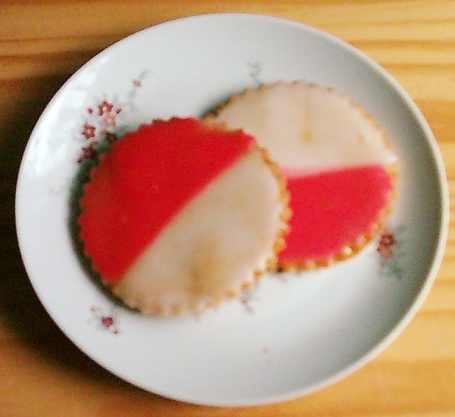 Hanseat (Gebäck) Source: GeorgHH eigene Aufnahme Date: Juni 2006